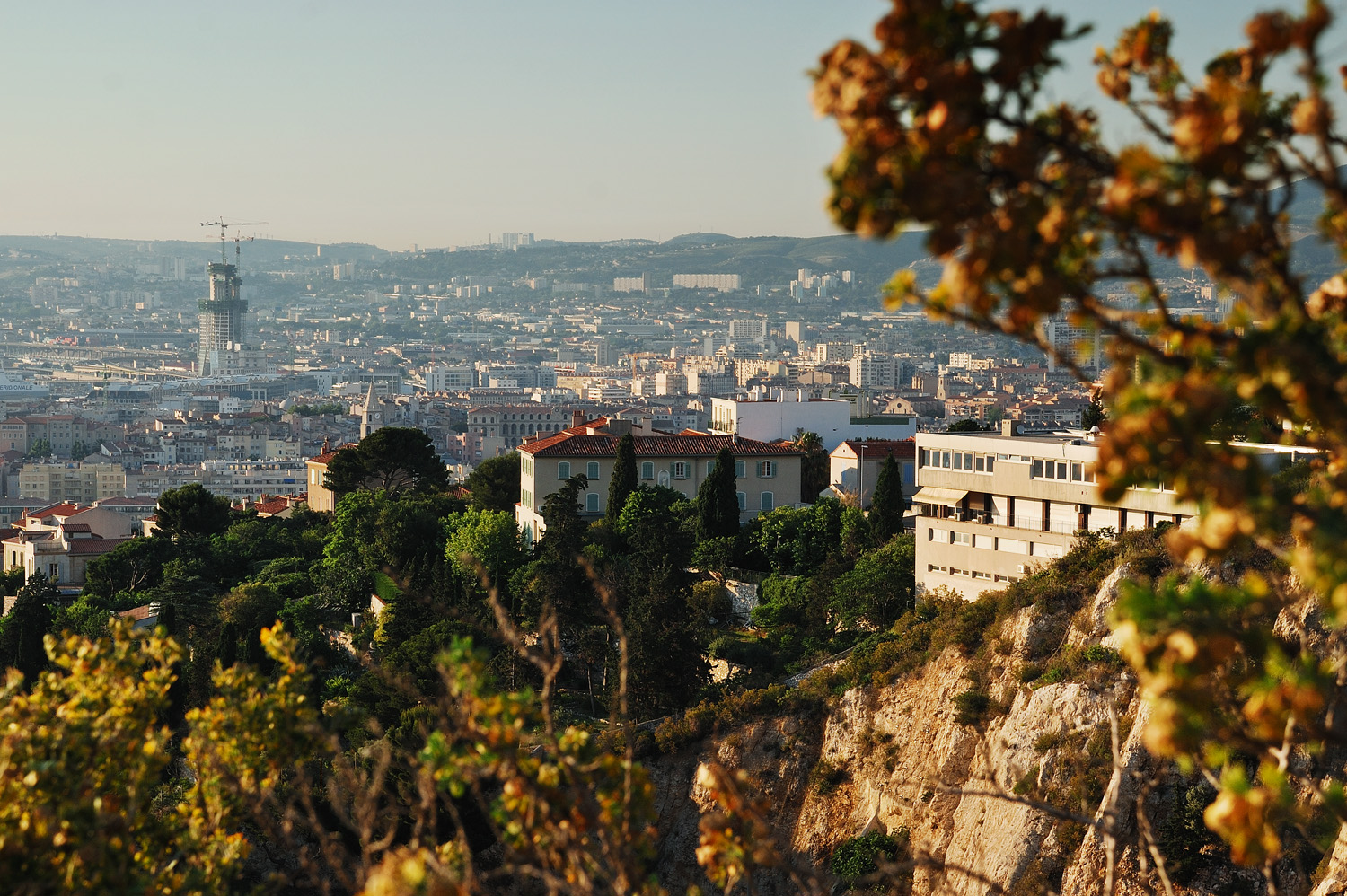 Марсель, Франция. Вид на город